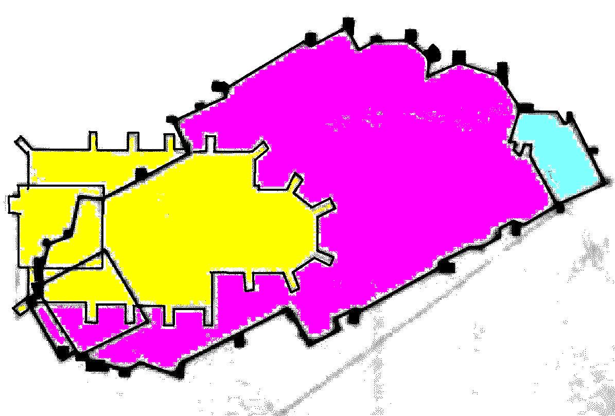 Zeitleiste der Baugeschichte und Grundriss der Propsteikirche St. Urbanus in Gelsenkirchen-Buer.